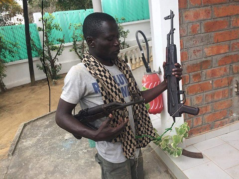 Le colonel Korombo remettant ses deux kalachnikovs à Kinkala, au Congo-Brazzaville, le 23 septembre 2018. (VOA/Arsène Séverin) Venu librement et volontairement remettre ses deux kalachnikovs, le colonel Korombo, un chef d'écurie ninjas, déclare que pour eux, la guerre est définitivement terminée, et les armes sont effectivement rendues.